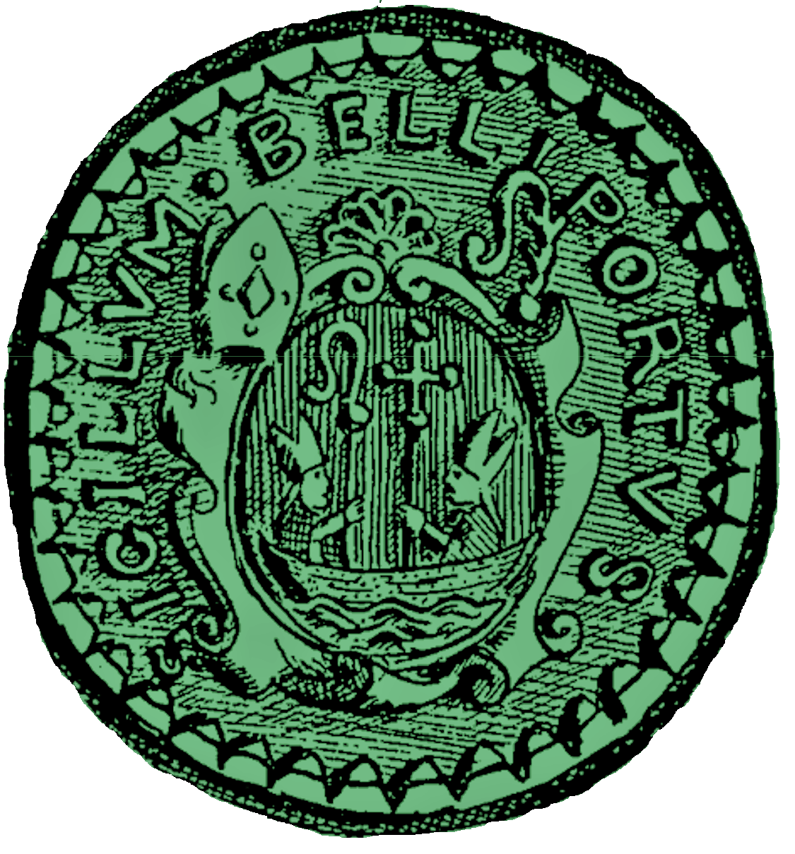 Paimpol (22), Abbaye de Beauport, Sceau du XVIIIe siècle (image du domaine public modifiée)